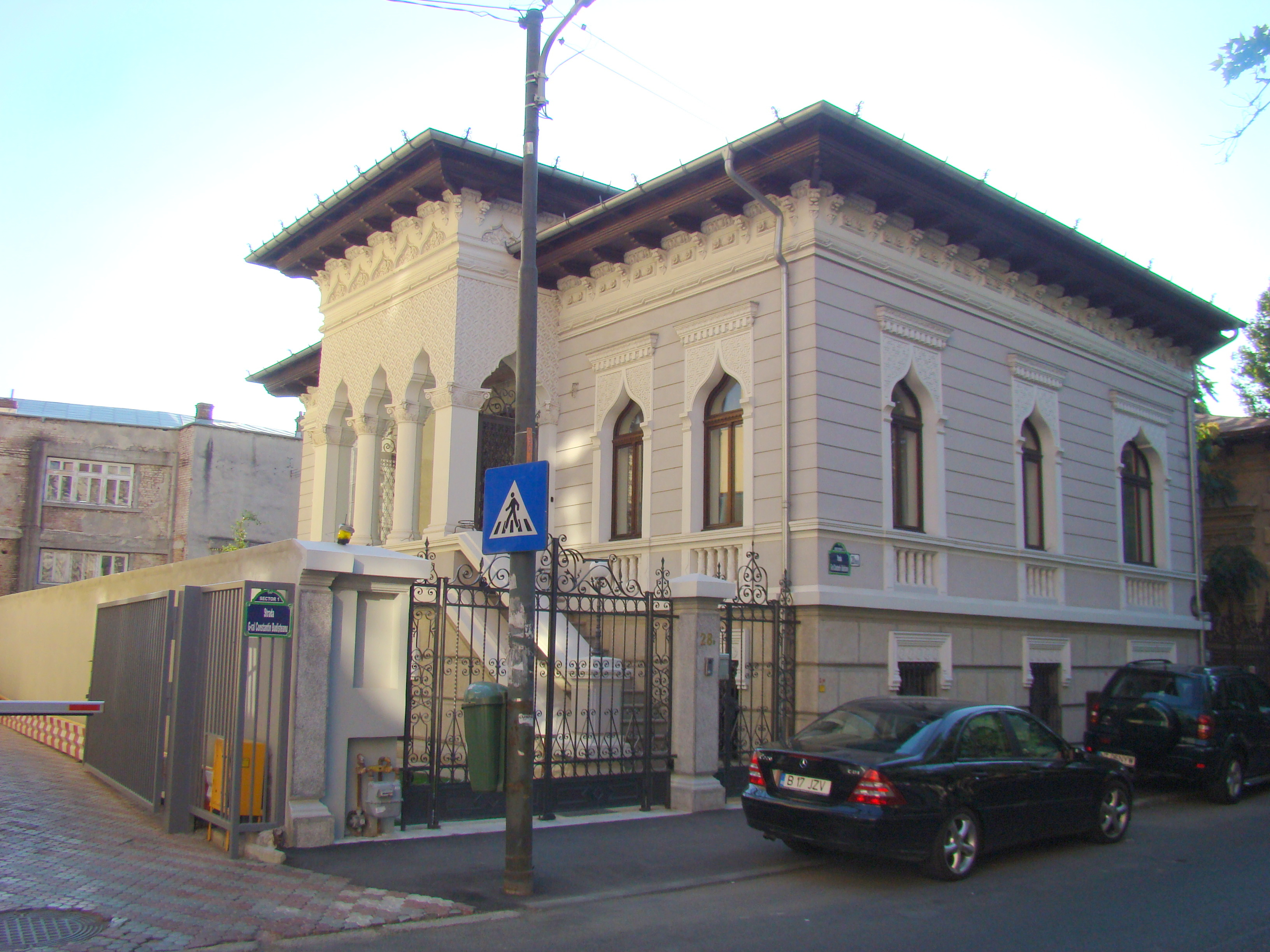 Casă monument istoric, str. Constantin Budișteanu, nr.28bis